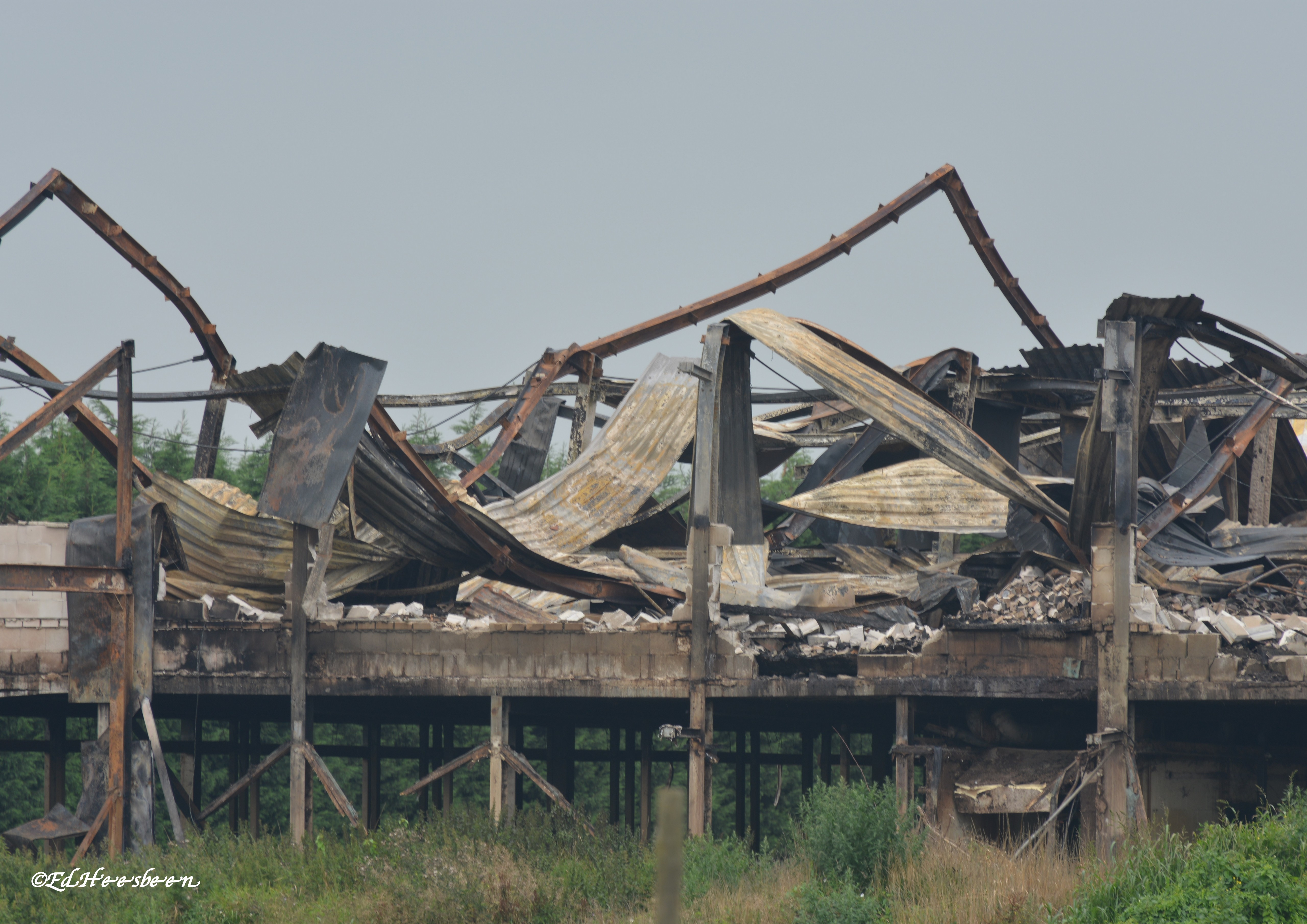 Stalbrand bij De Knorhof in Erichem eind juli 2017.